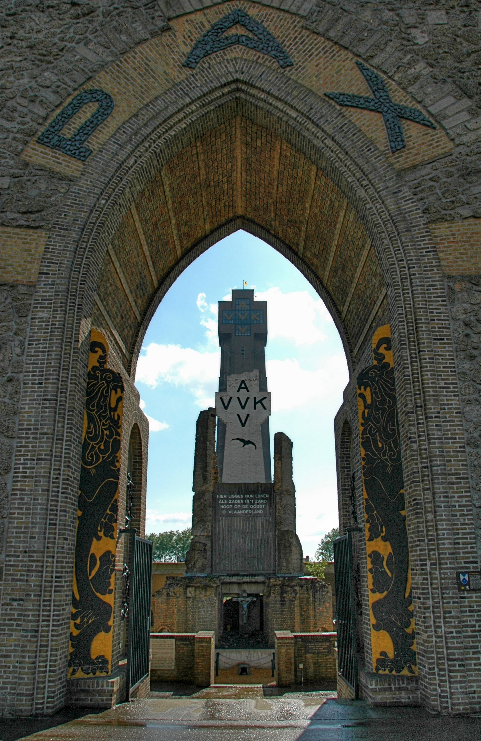 Allen Voor Vlaanderen